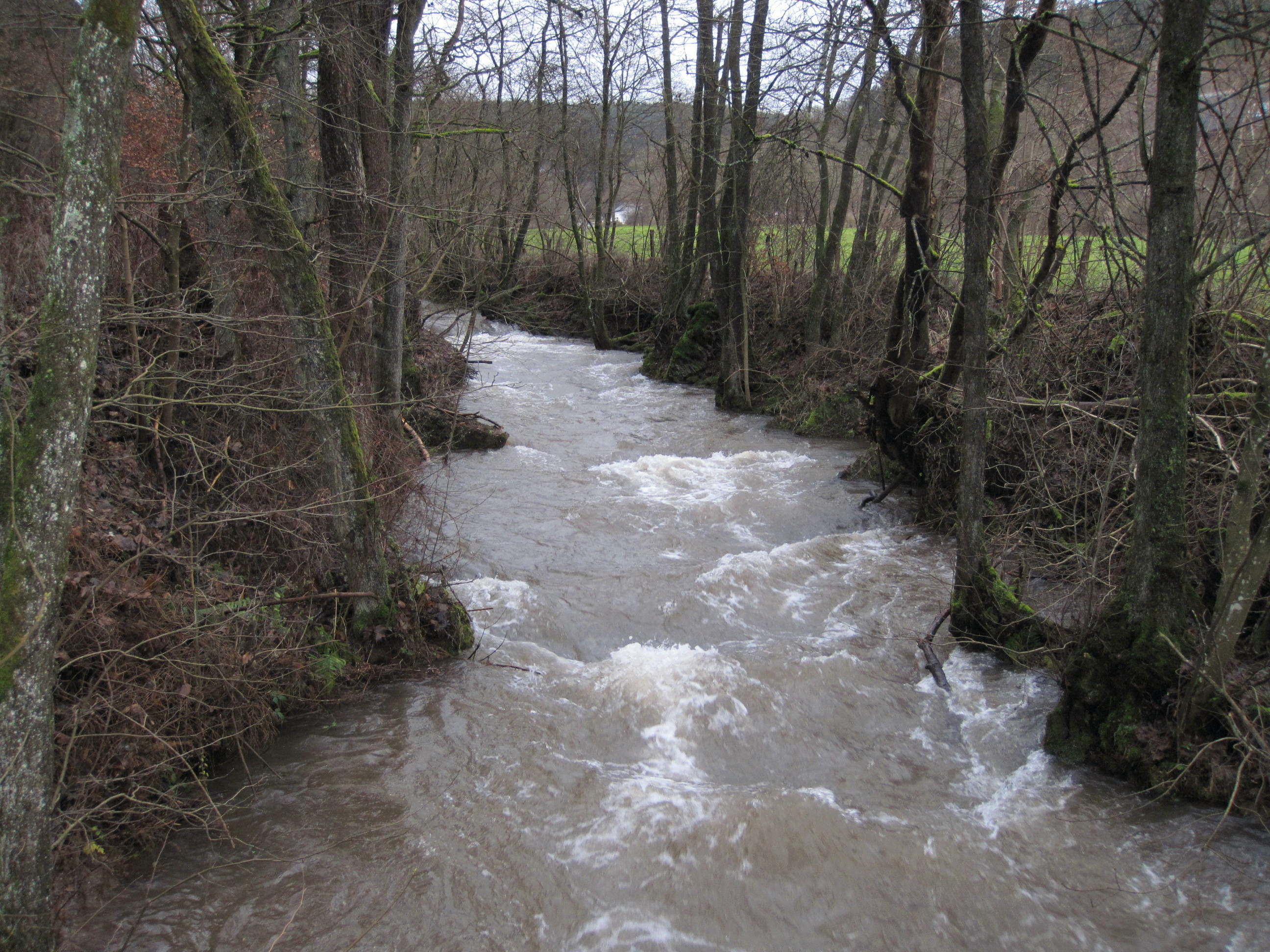 Platißbach beim Campingplatz Hellenthal, Blickrichtung: Südwesten